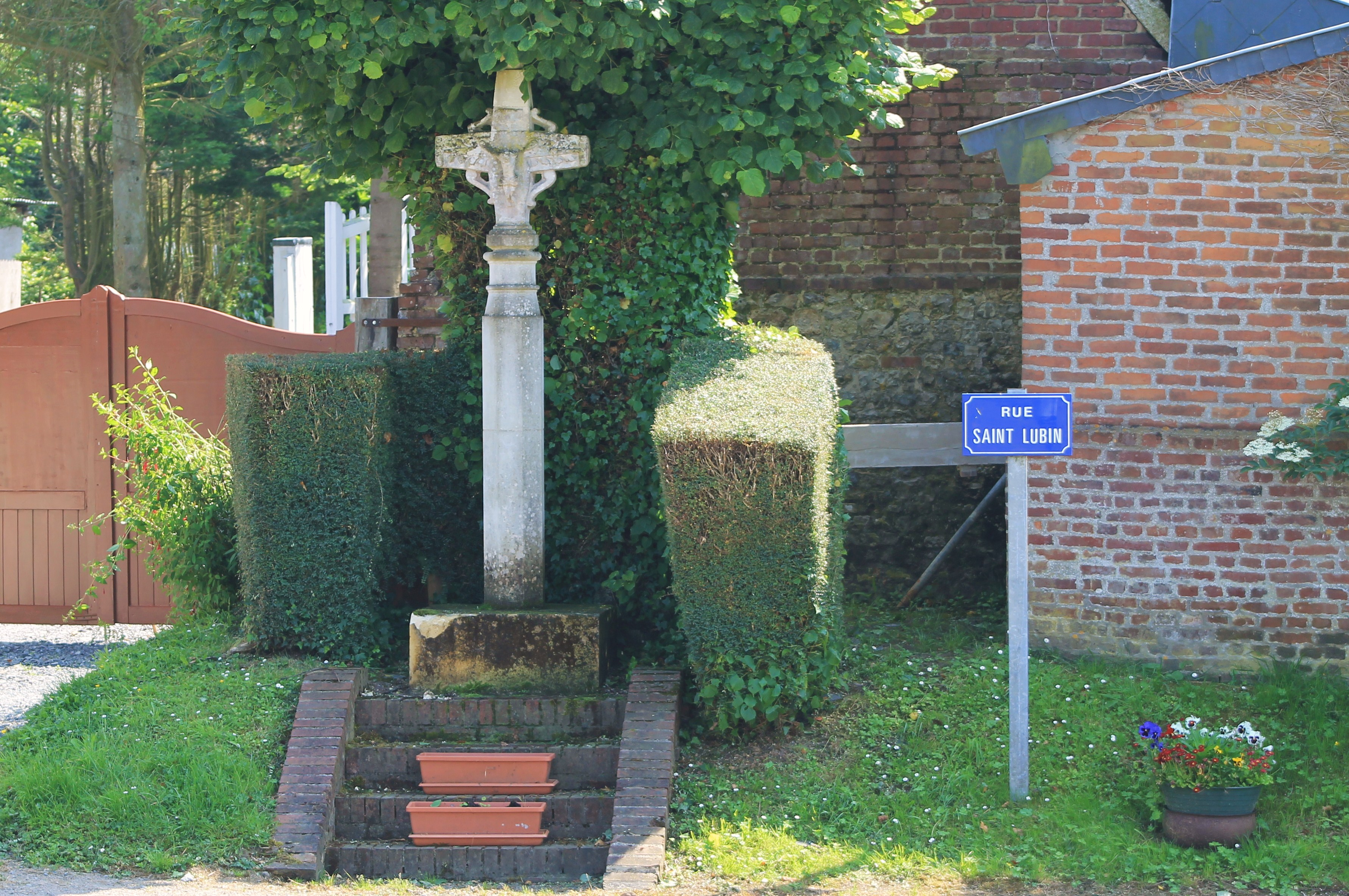 Croix au lieu dit La-Croix-d'Heuland, commune de Heuland (Calvados) Cette croix est bien celle qui est versée par l'arrêté du 17 mai 1933 à l'inventaire supplémentaire des Monuments Historiques. Contrairement à la notice de la base mérimée, l'arrêté ne fait aucune mention du nom de Rollon , il situe bien ce monument au carrefour dit de la Croix d'Heuland et le date du XVIe siècle.De même, la croix signalée par A. de Caumont se trouve bien aussi à ce même endroit : l'embranchement de la route de Dives sur Mer à Pont-l'Evêque avec celle de Dives à Touques. Il ne mentionne pas non plus l'inscription relative à Rollon Excursion de Trouville à Dives par Touques et Tourgévilleen 1853 avec carte de l'époque.